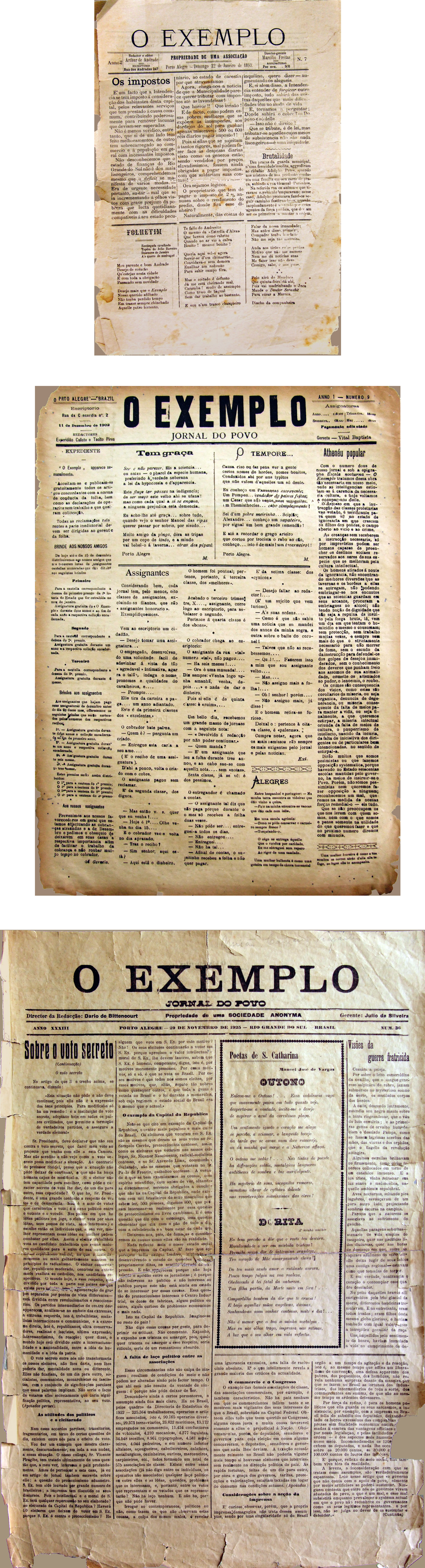 O Exemplo, Porto Alegre, edições de 1893, 1902 e 1925. Formatos: 1893, aprox. 21,5 x 31 cm (redator e editor: Arthur de Andrade; diretor-gerente: Marcílio Freitas); 1902, aprox. 32 x 44,5 cm (redatores: Espiridião Calisto e Tácito Pires; gerente: Vital Baptista); 1925, aprox. 36x56 cm (diretor: Dario de Bittencourt; gerente: Julio da Silveira). Imagens manipuladas digitalmente. Exemplares do Museu de Comunicação Social Hipólito José da Costa, Porto Alegre.